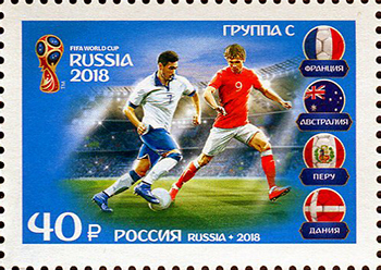 Группа С.